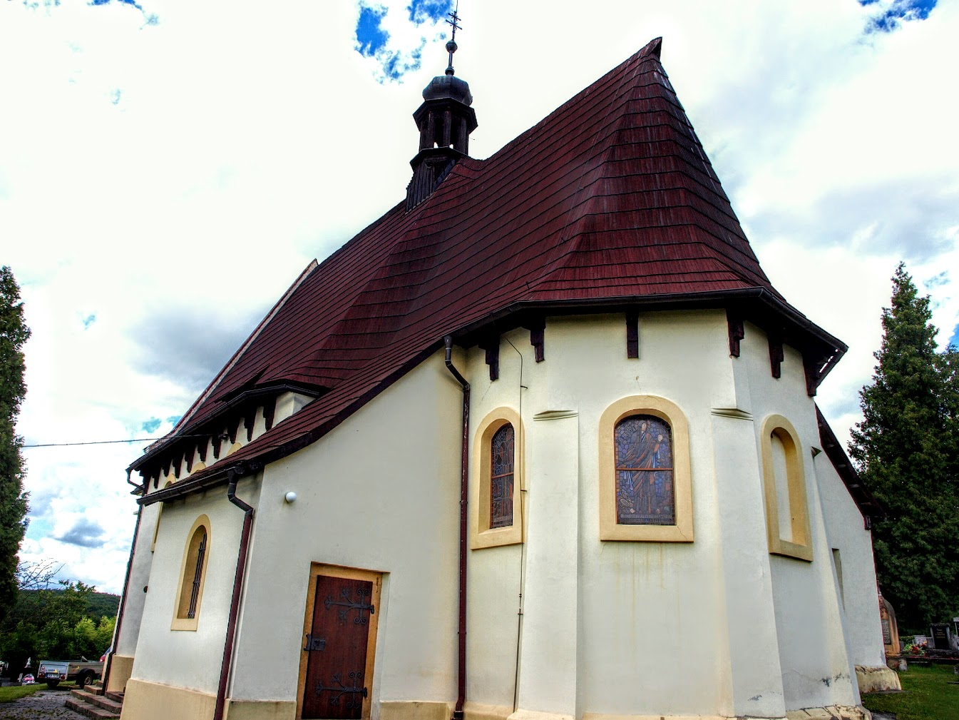 Mcely, kostel sv. Václava